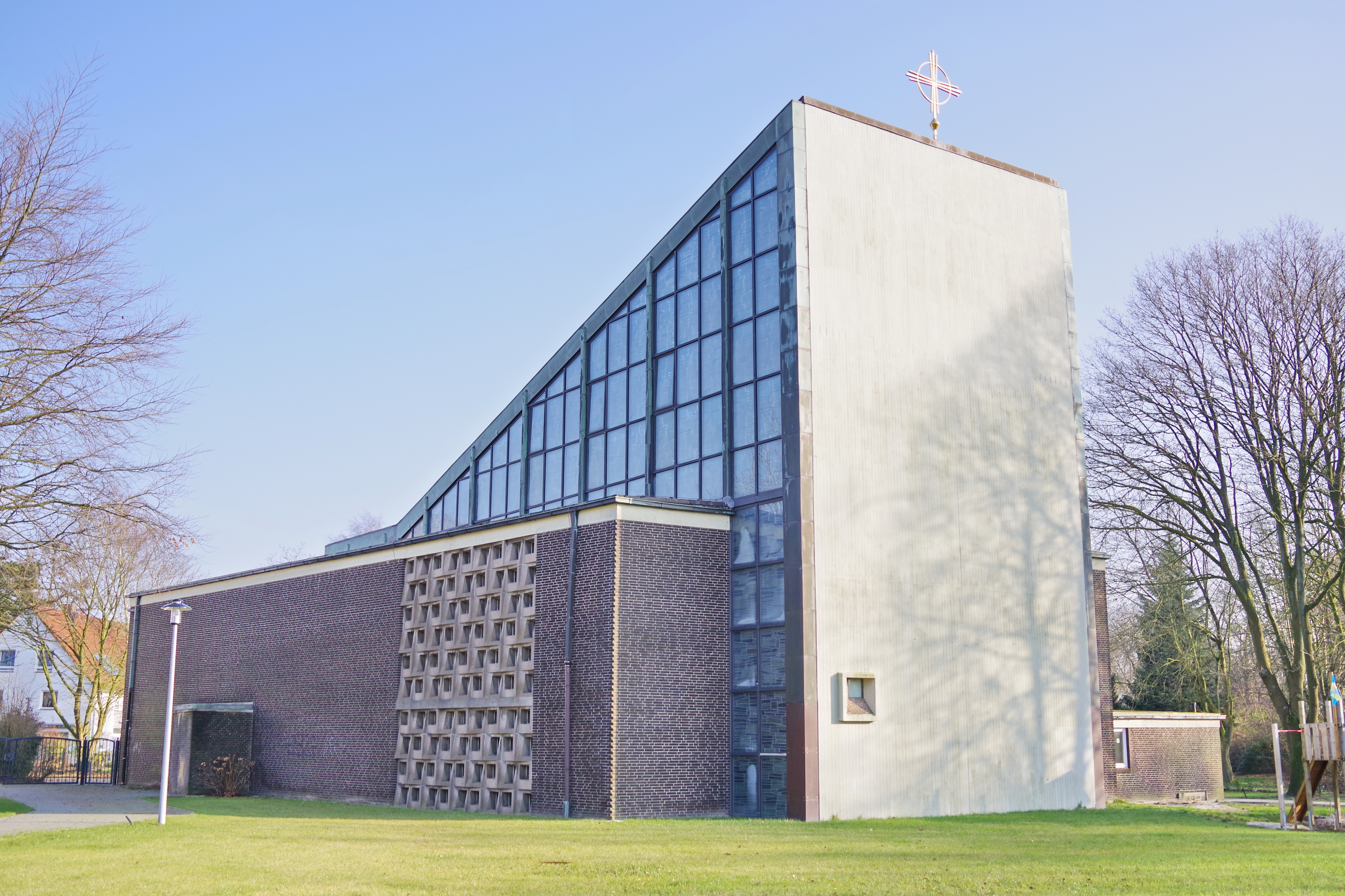 Ehemals kath. Kirche St. Willehad jetzt Freie Christengemeinde in Bremen-Aumund